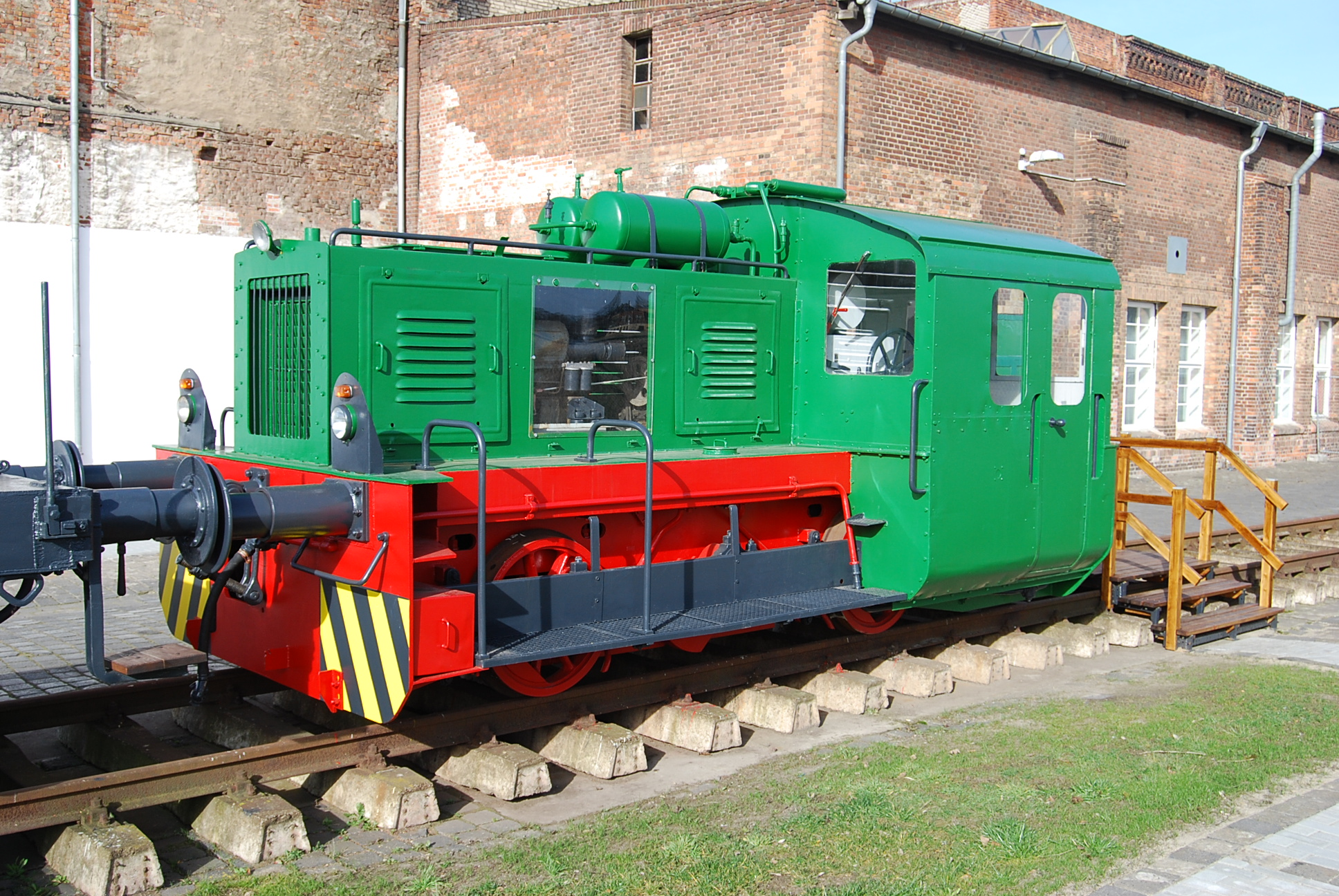 Kö II